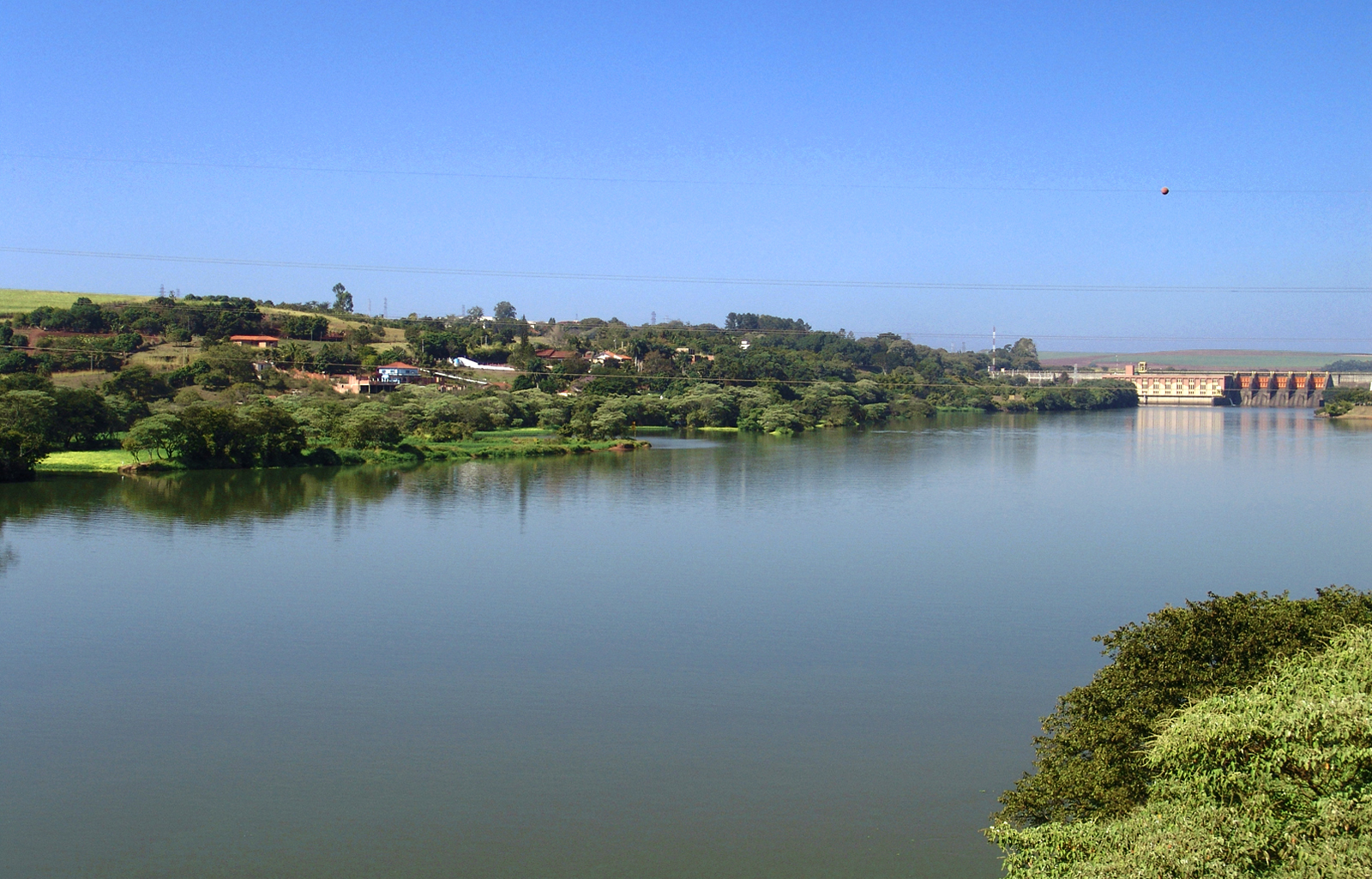 Rio Tietê e a Barragem na cidade de Barra Bonita